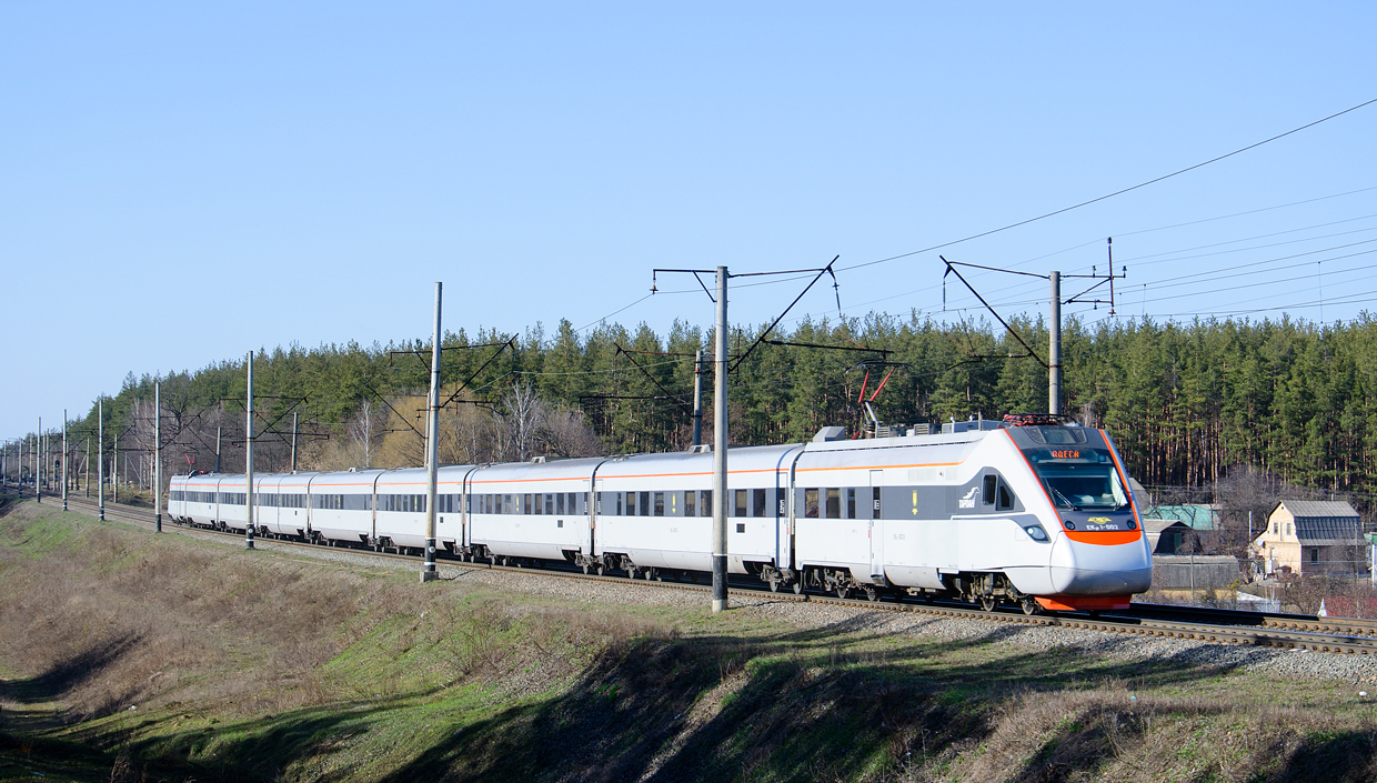 Электропоезд ЭКр1-002 на перегоне Боярка - Васильков-I, Киевская область, Украина